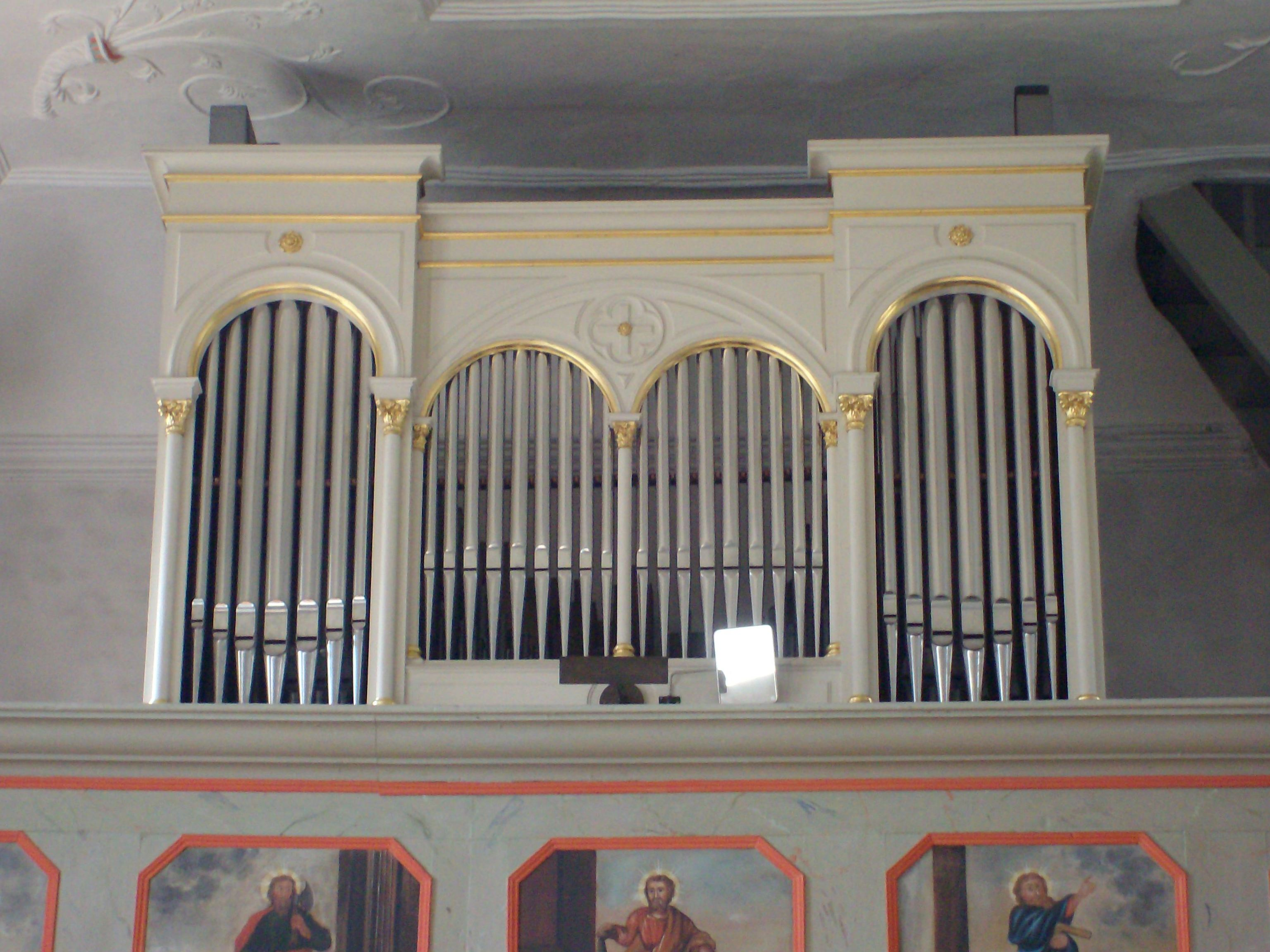 Orgel in Niederkleen